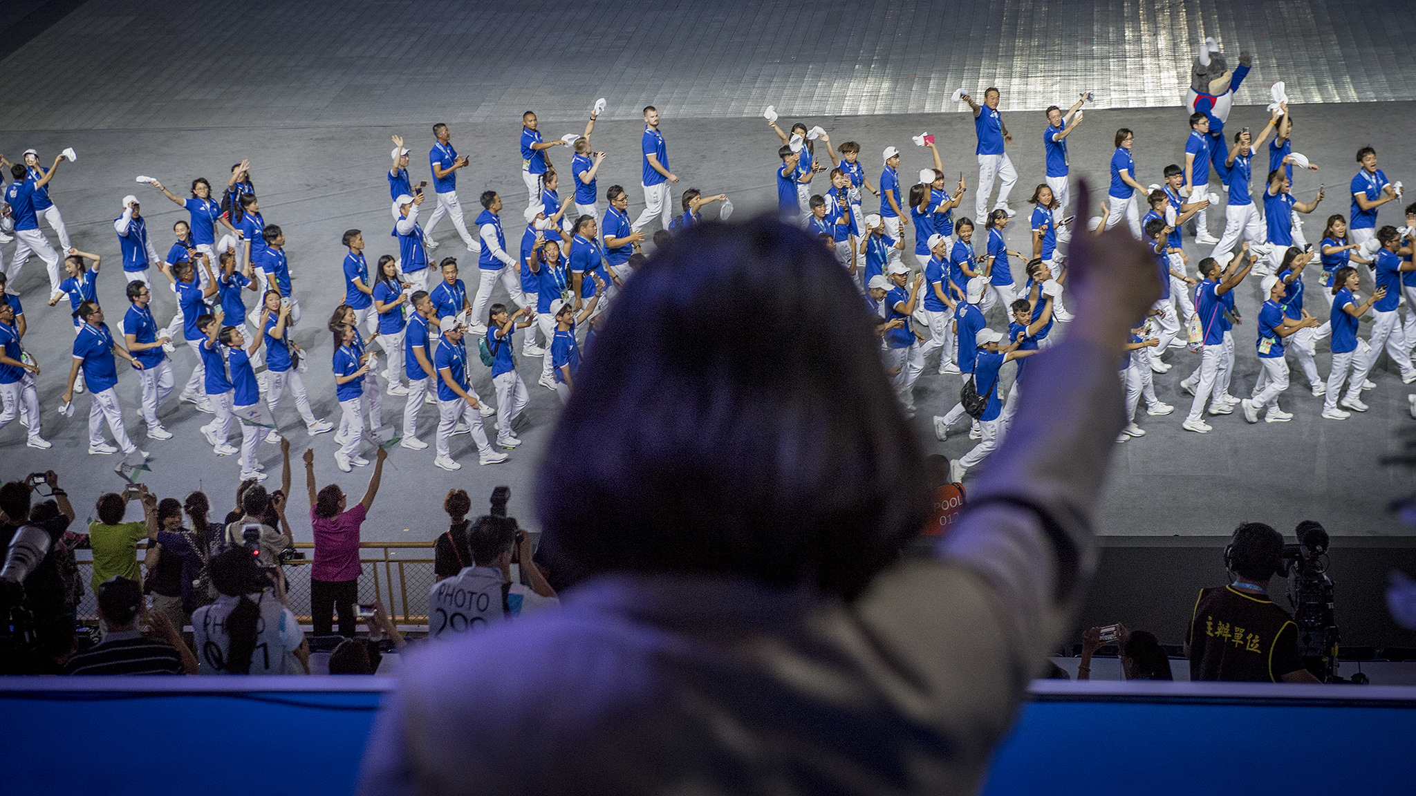 中華民國總統蔡英文出席2017臺北世界大學運動會開幕典禮，於中華臺北代表隊進場時起立致意。